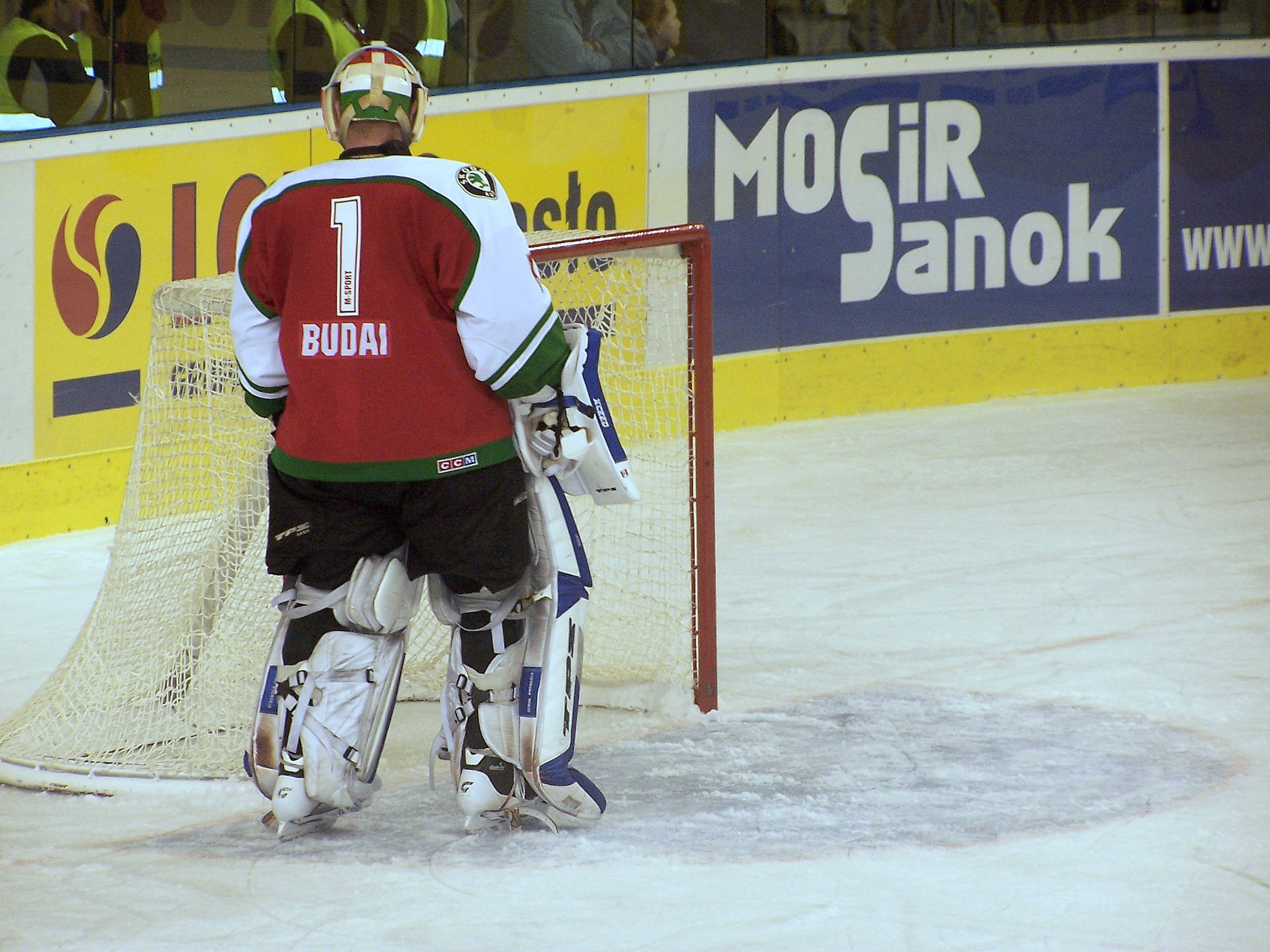 Krisztián Budai w barwach reprezentacji Węgier w meczu z Polską Arena Sanok 12 kwietnia 2006